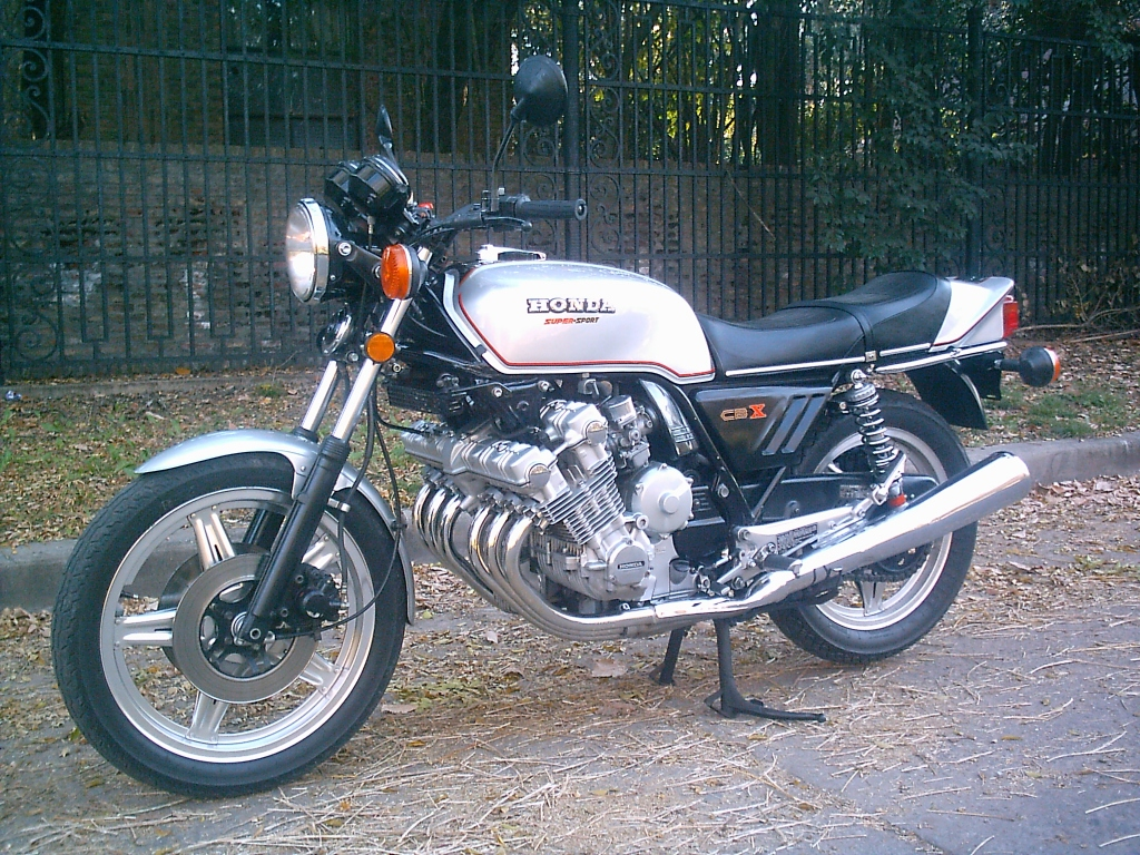 Honda CBX 1000 del año 1978. Imagen tomada en Buenos Aires, Argentina.